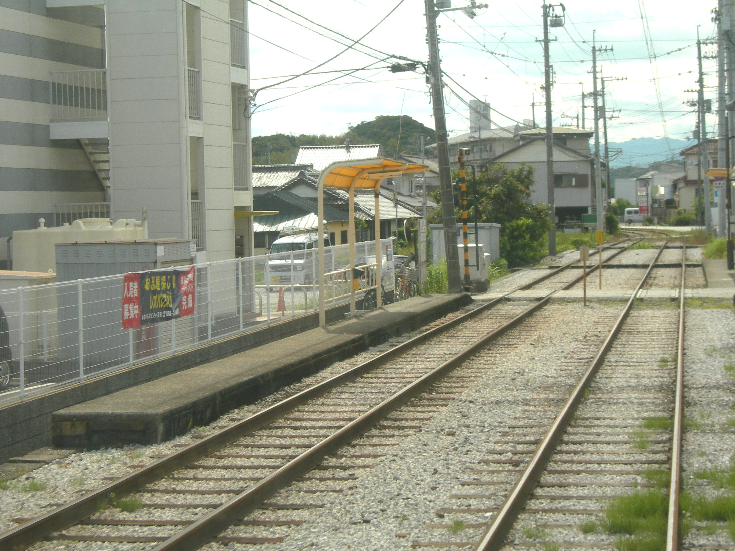 土佐電気鉄道篠原電停。